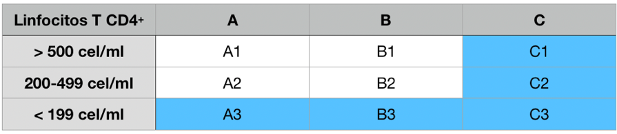 Tabla de clasificación de los infectados por VIH (OMS). • Categoría A: pacientes en la fase precoz de la infección. • Categoría B: pacientes que no se encuentran en las categorías A y C. • Categoría C: pacientes con síntomas característicos del sida. Sólo los pacientes pertenecientes a las casillas azules tienen sida, las otras categorías sólo se considera infección por VIH.